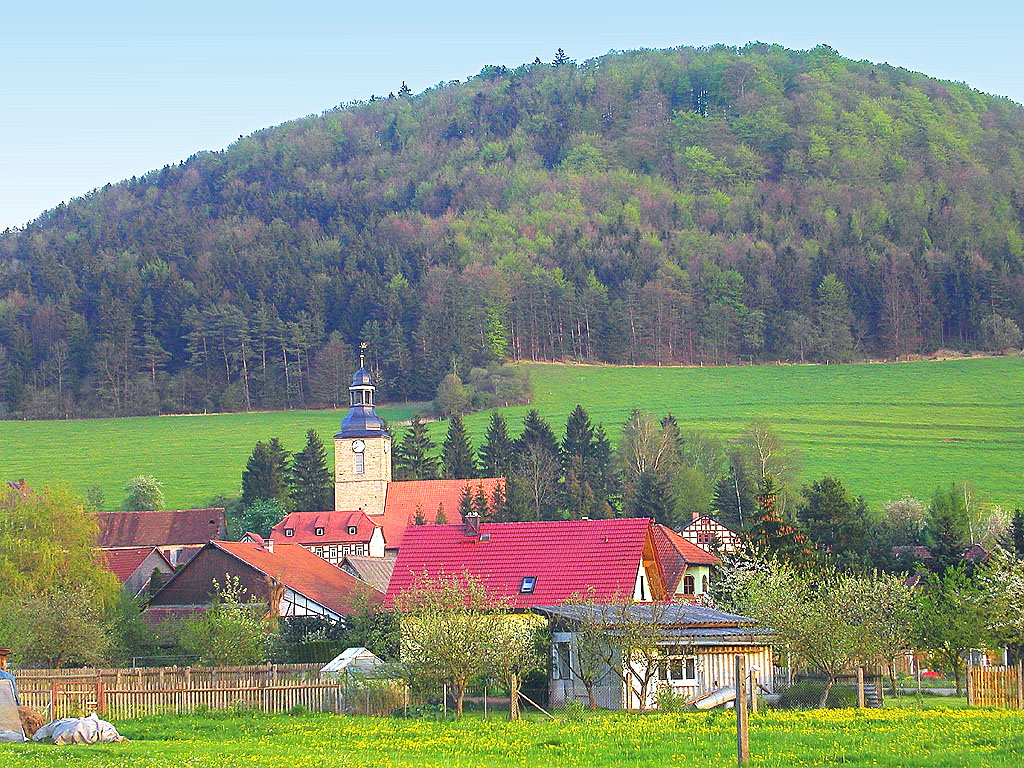 Ansicht der Gemeinde Belrieth in Thüringen, mit Dorfkirche